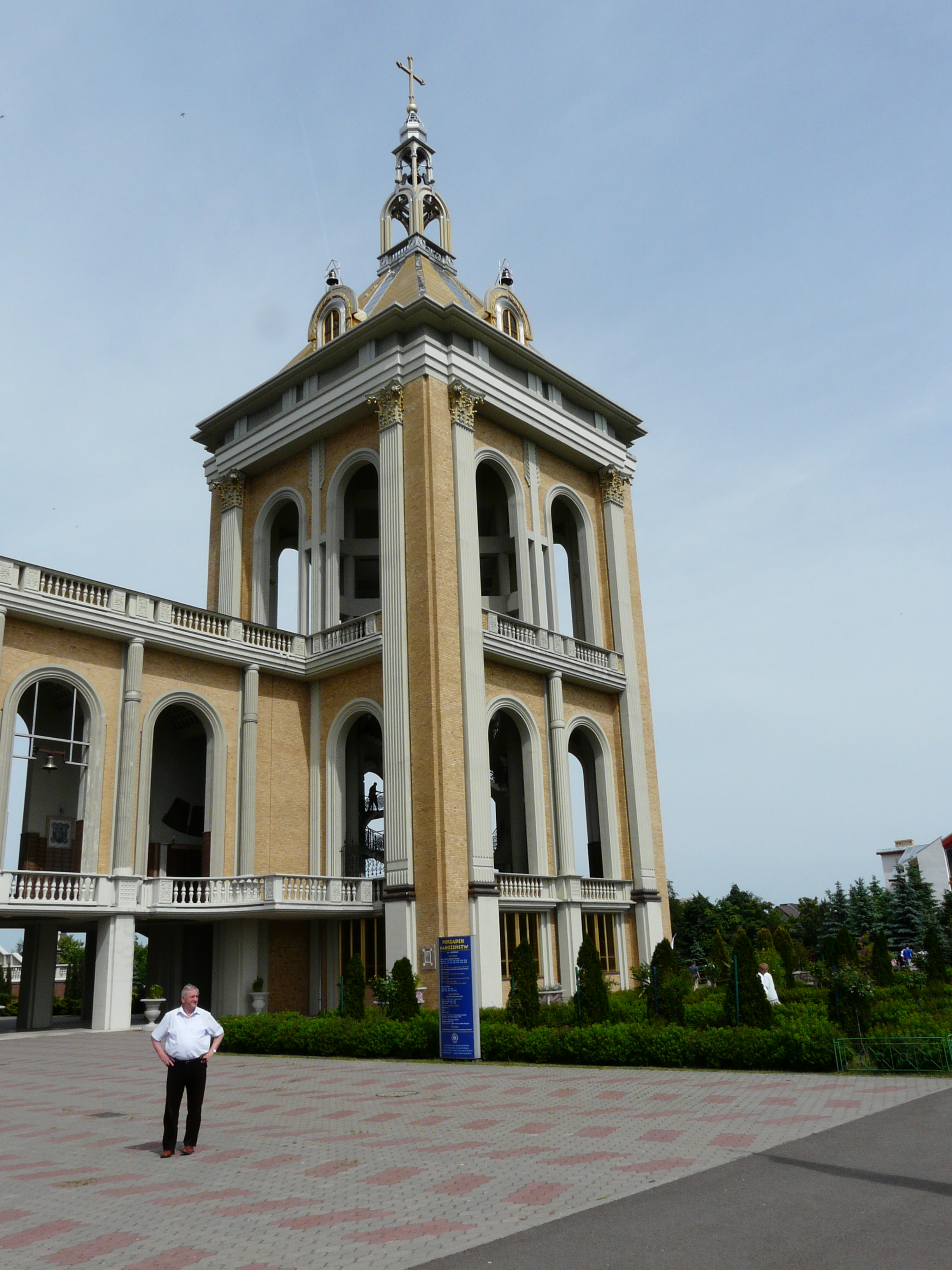 Licheń